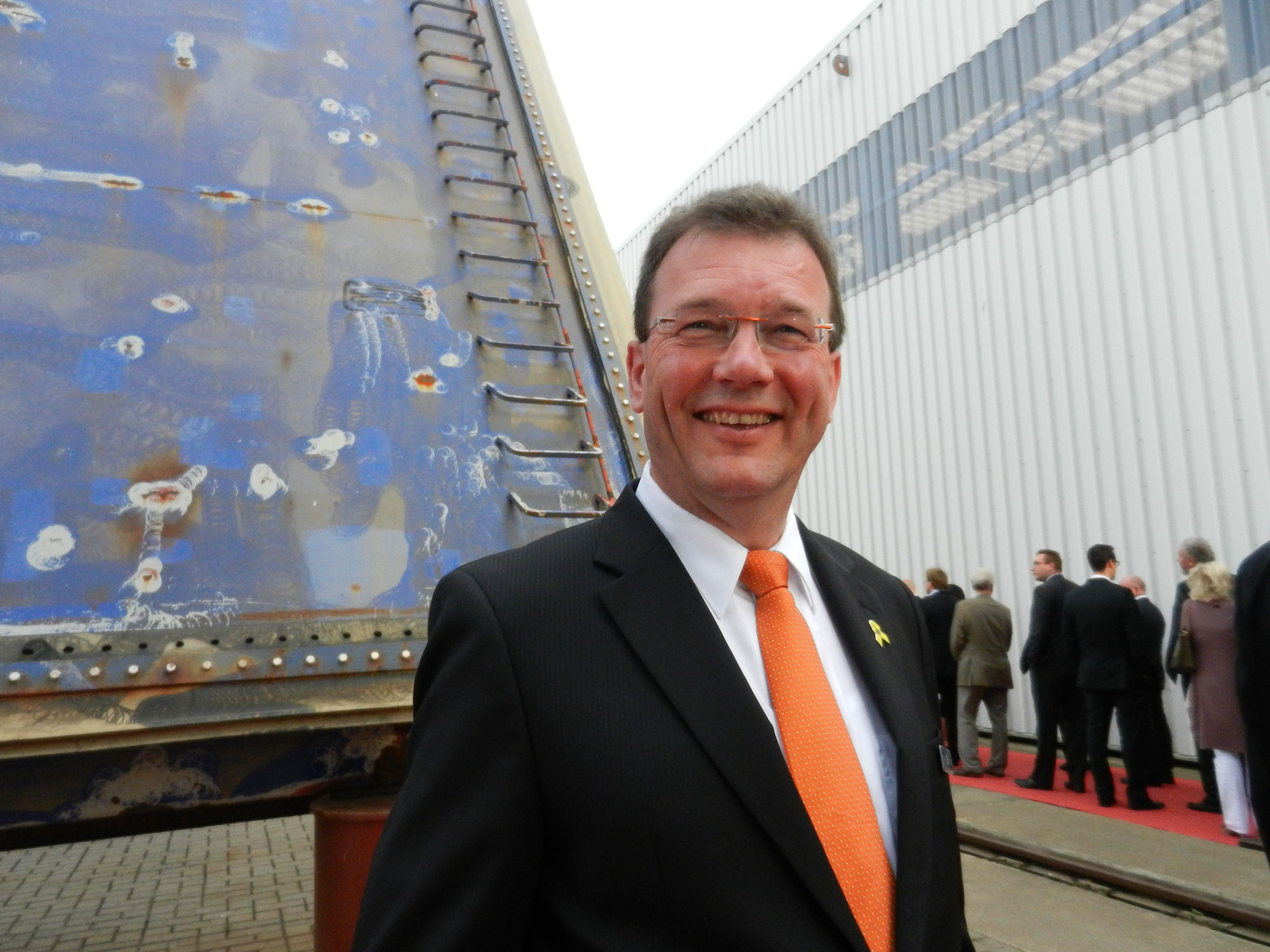 Präsident Wolfgang Steimels bei einem Empfang des Oberbürgermeisters von Rostock anläßlich der HanseSail 2012